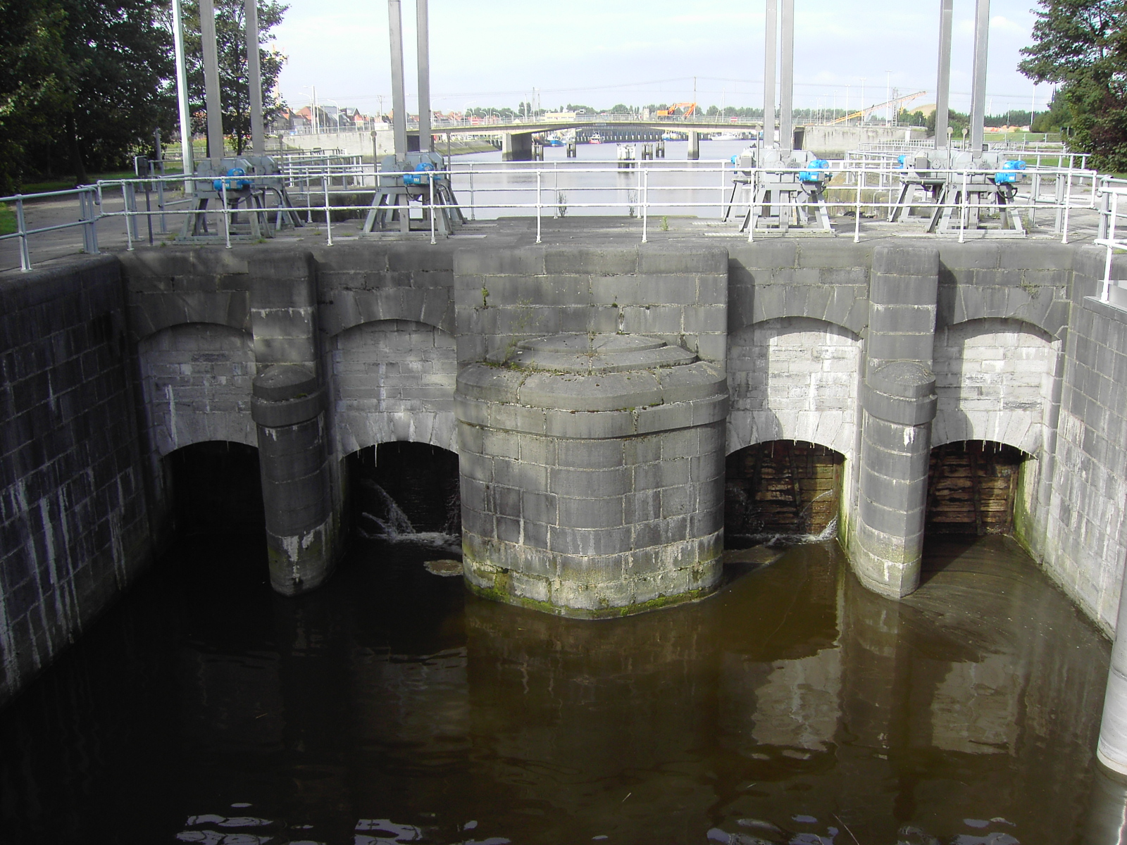 De vier overlaten van het Scheursas of Springsas